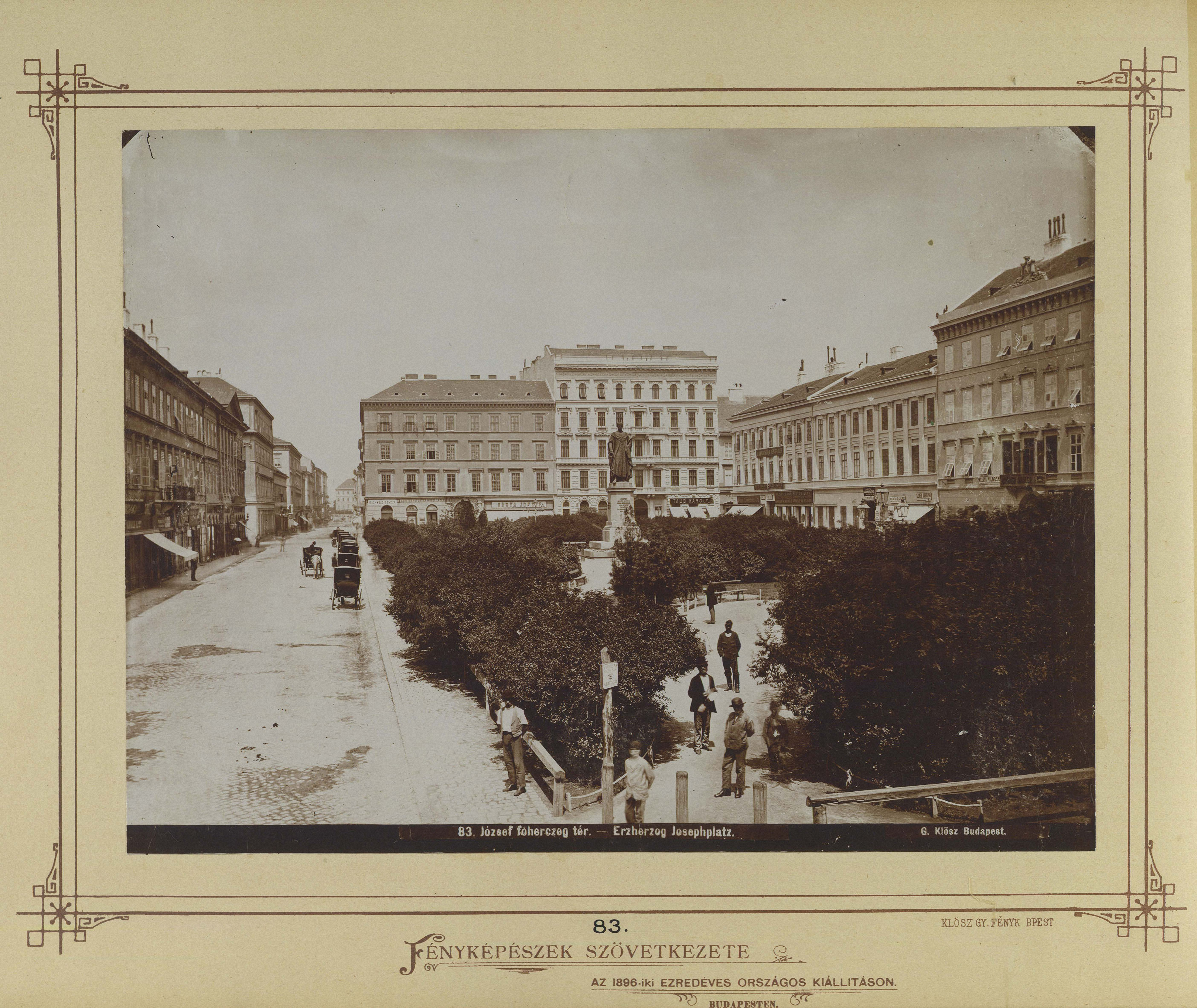 József nádor (József) tér. A felvétel 1873 körül készült, még az előtt, hogy a sétányt övező fakorlátokat vasra cserélték. Location: Hungary, Budapest V. Tags: Budapest, cab-horse